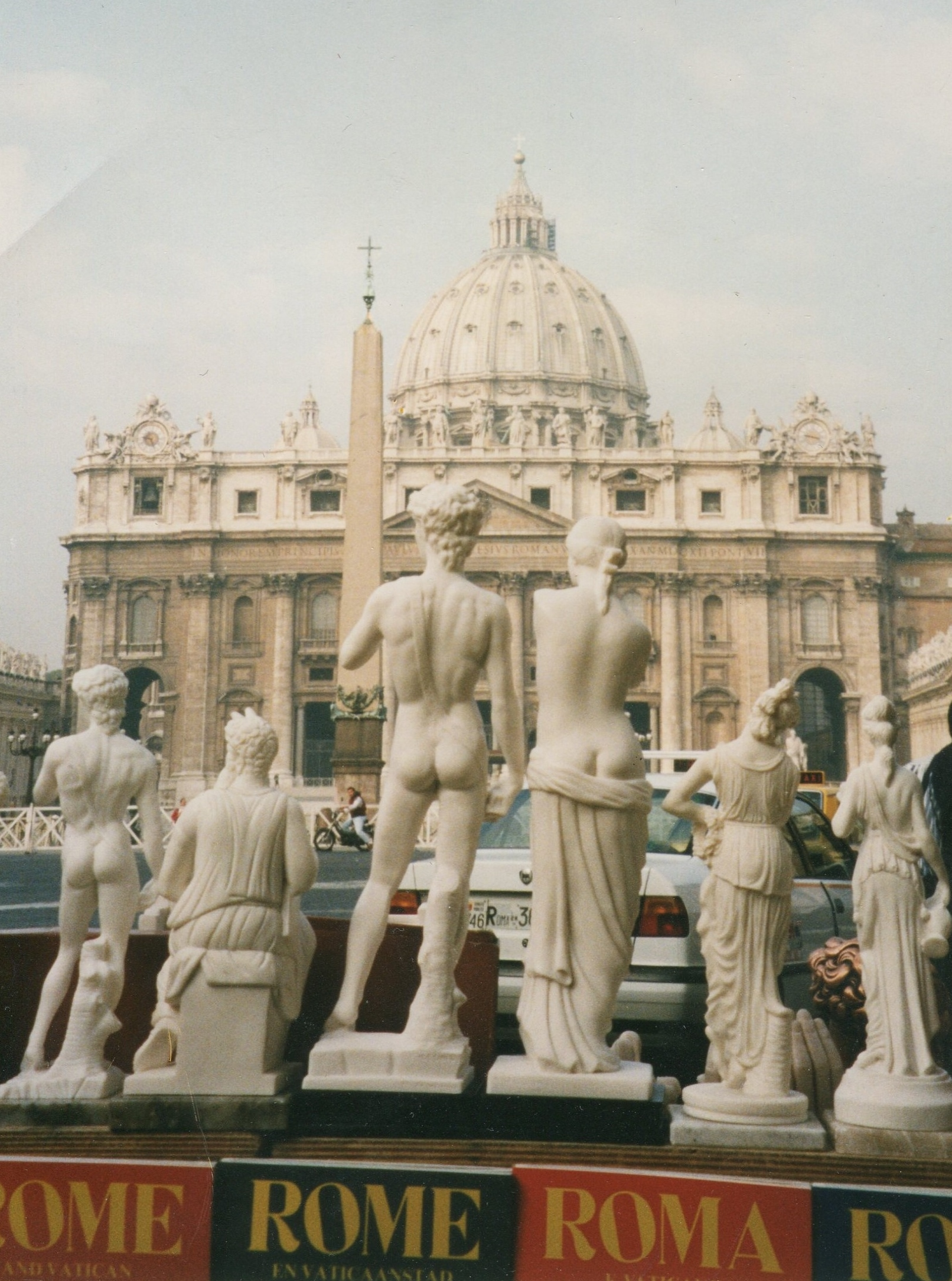 Souvenirstand auf dem Petersplatz in Rom